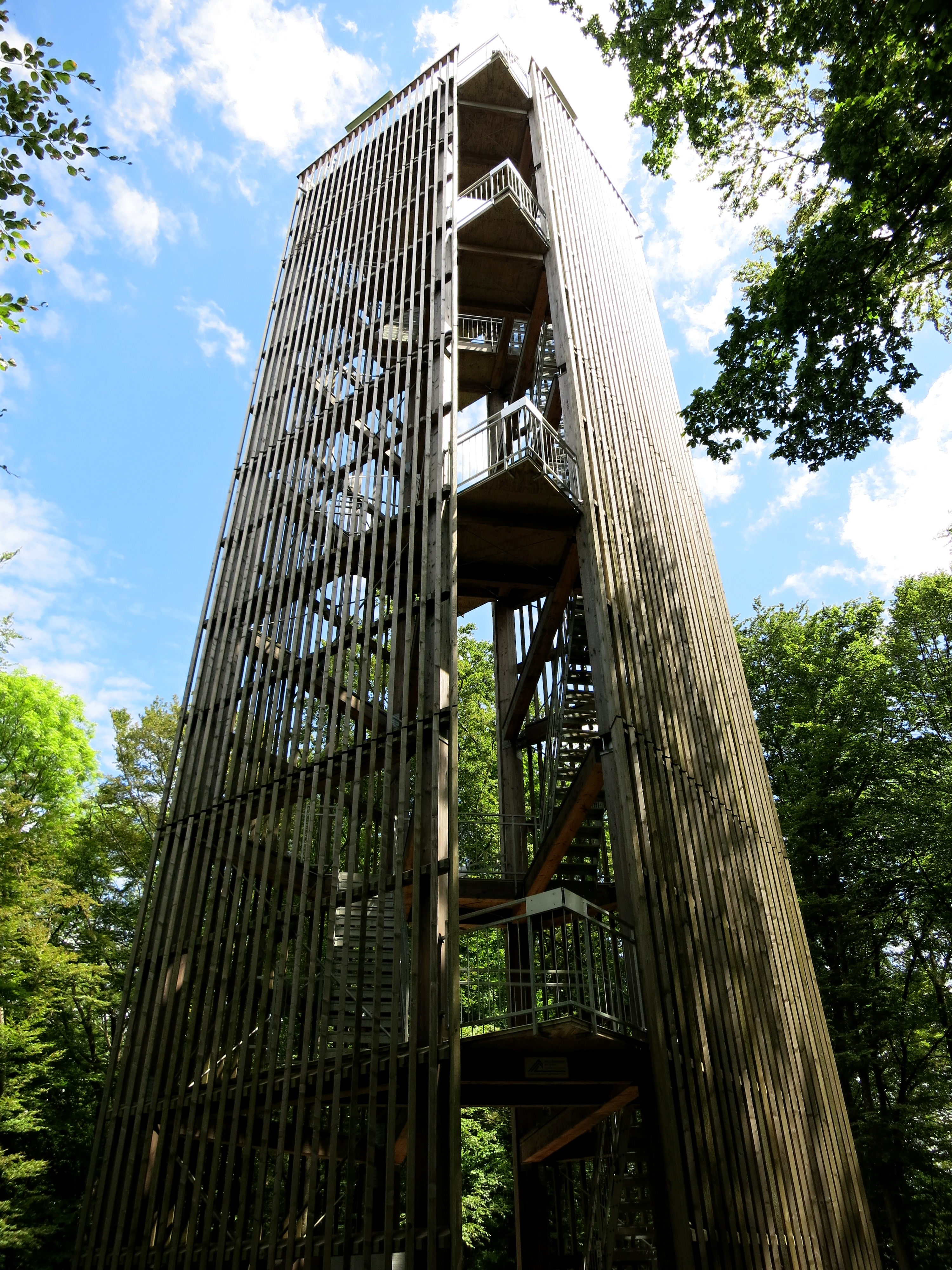 Cheisacherturm